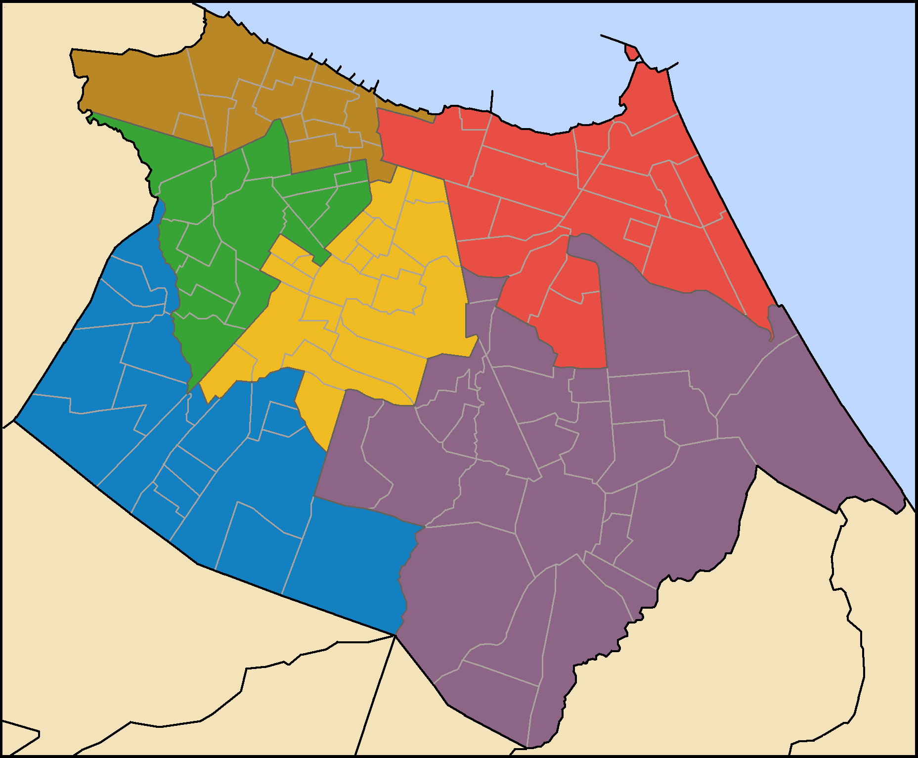 Mapa dos bairros e das Reginais da Cidade de Fortaleza, Brasil. Mapa modificado a partir do mapa criado por user:davidandrade.